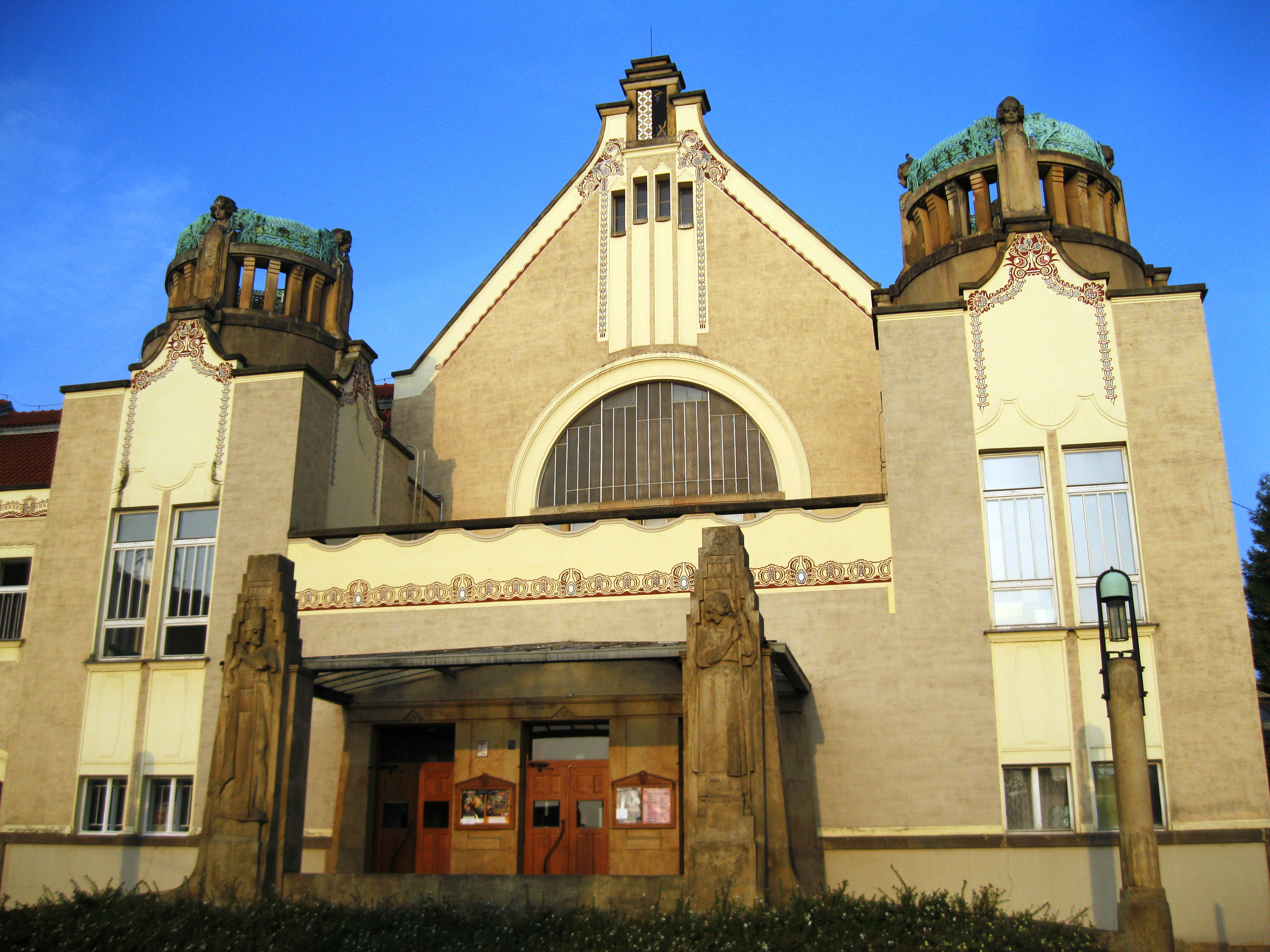 Společenský dům Národní dům (Prostějov), Vojáčkovo nám., Hlaváčkovo nám. 218/1, Prostějov